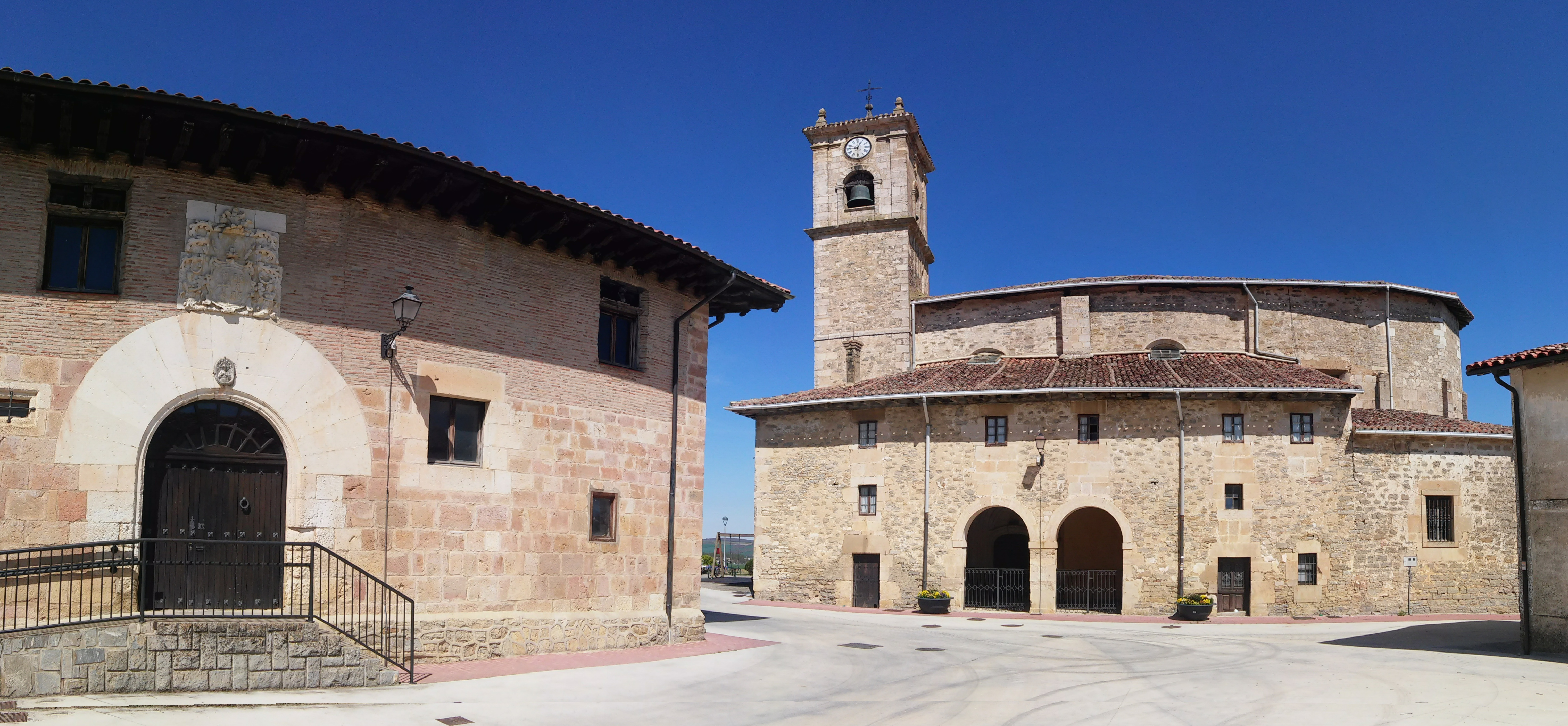 Gaunako plaza